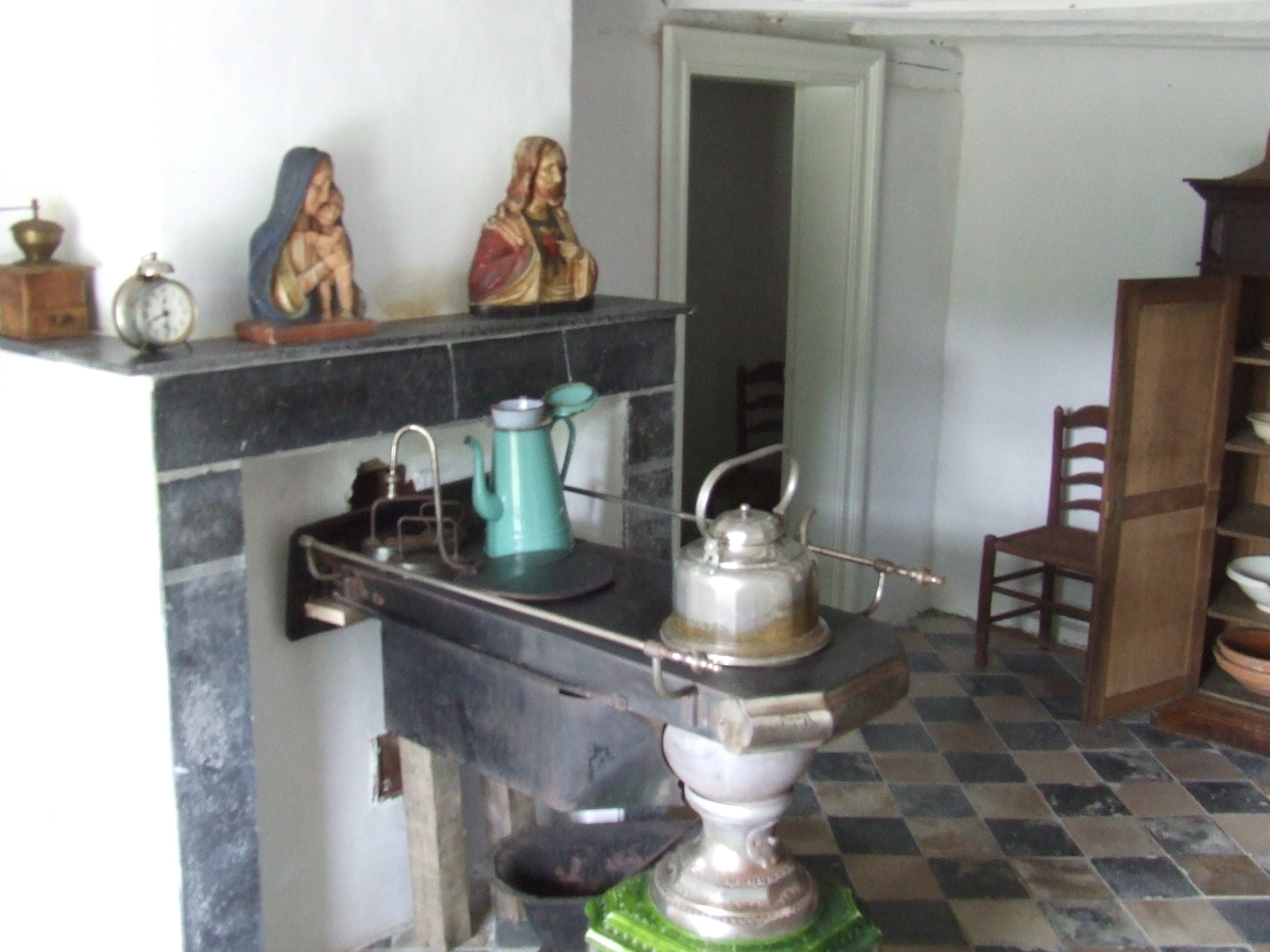 België, Vlaams-Brabant, Dilbeek, Dorpsplein nr.5; huis Mostinckx - leemen hoeve - zicht leefruimte